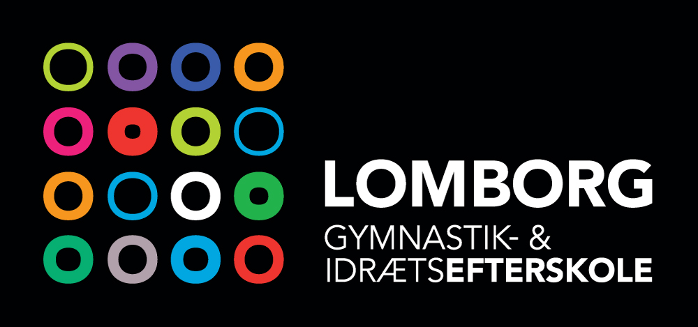 Lomborg Gymnastik- og Idrætsefterskoles logo